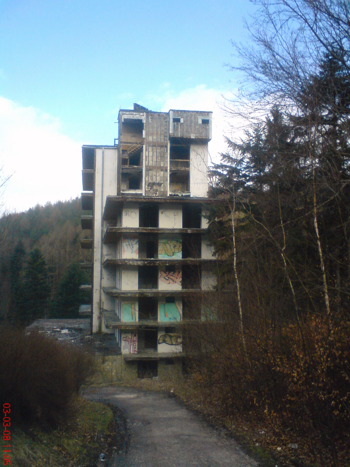 Budynek "Kiczora" ZDWSz Porąbka-Kozubnik